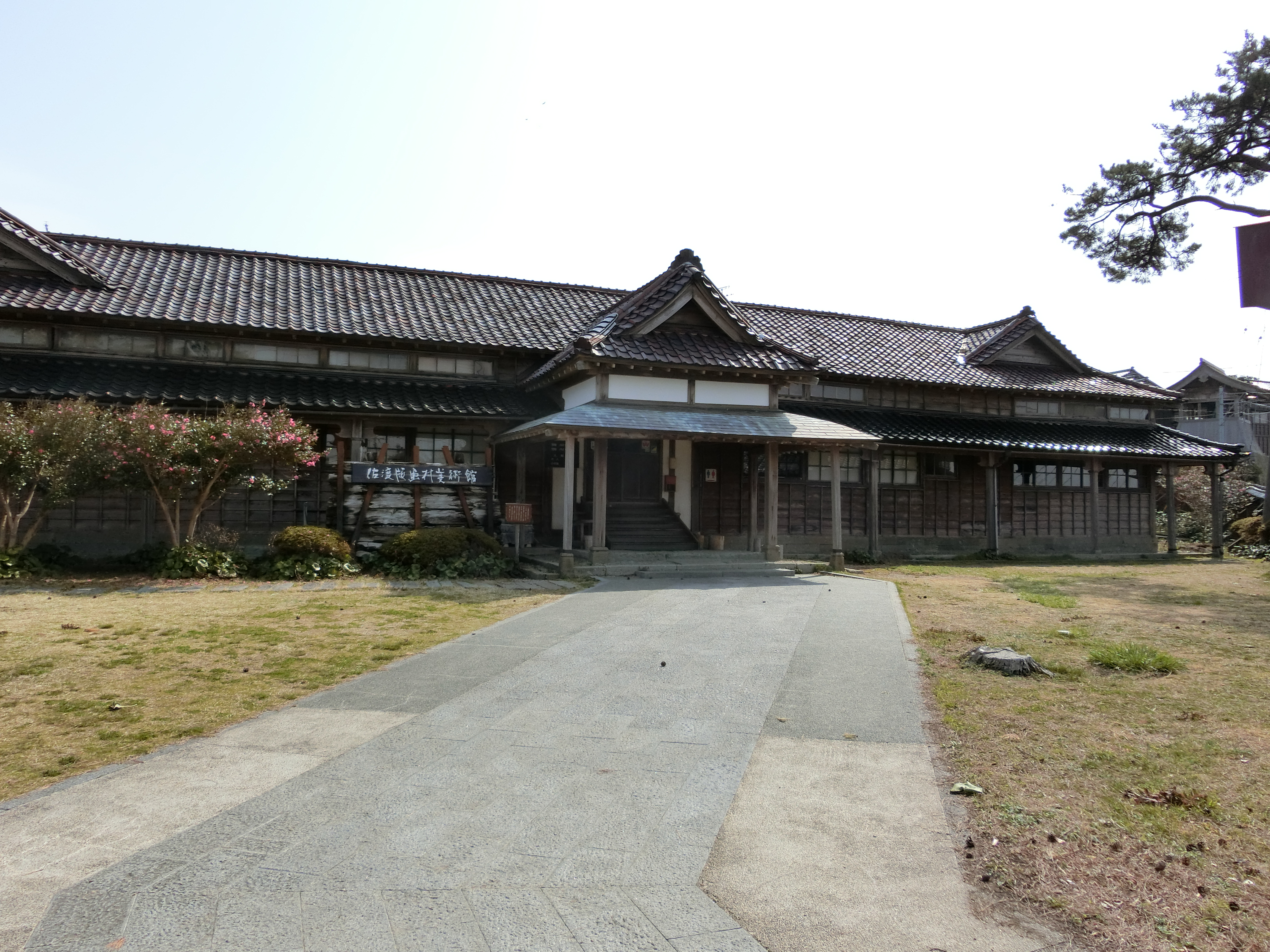 佐渡版画美術館